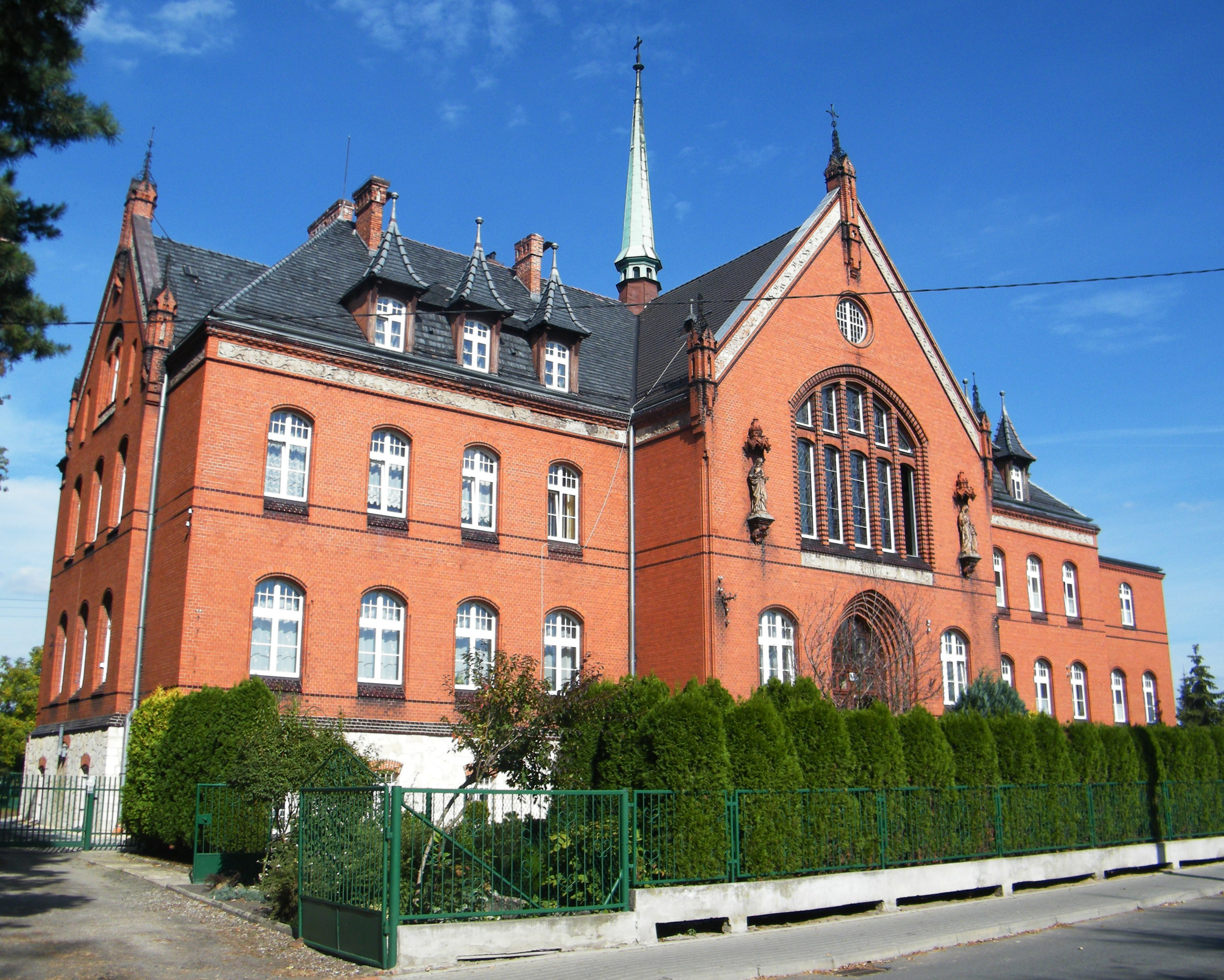 klasztor elżbietanek, ob. Dom Sióstr św. Józefa, 1903 Kluczbork, ul. Klasztorna 3, Kluczbork